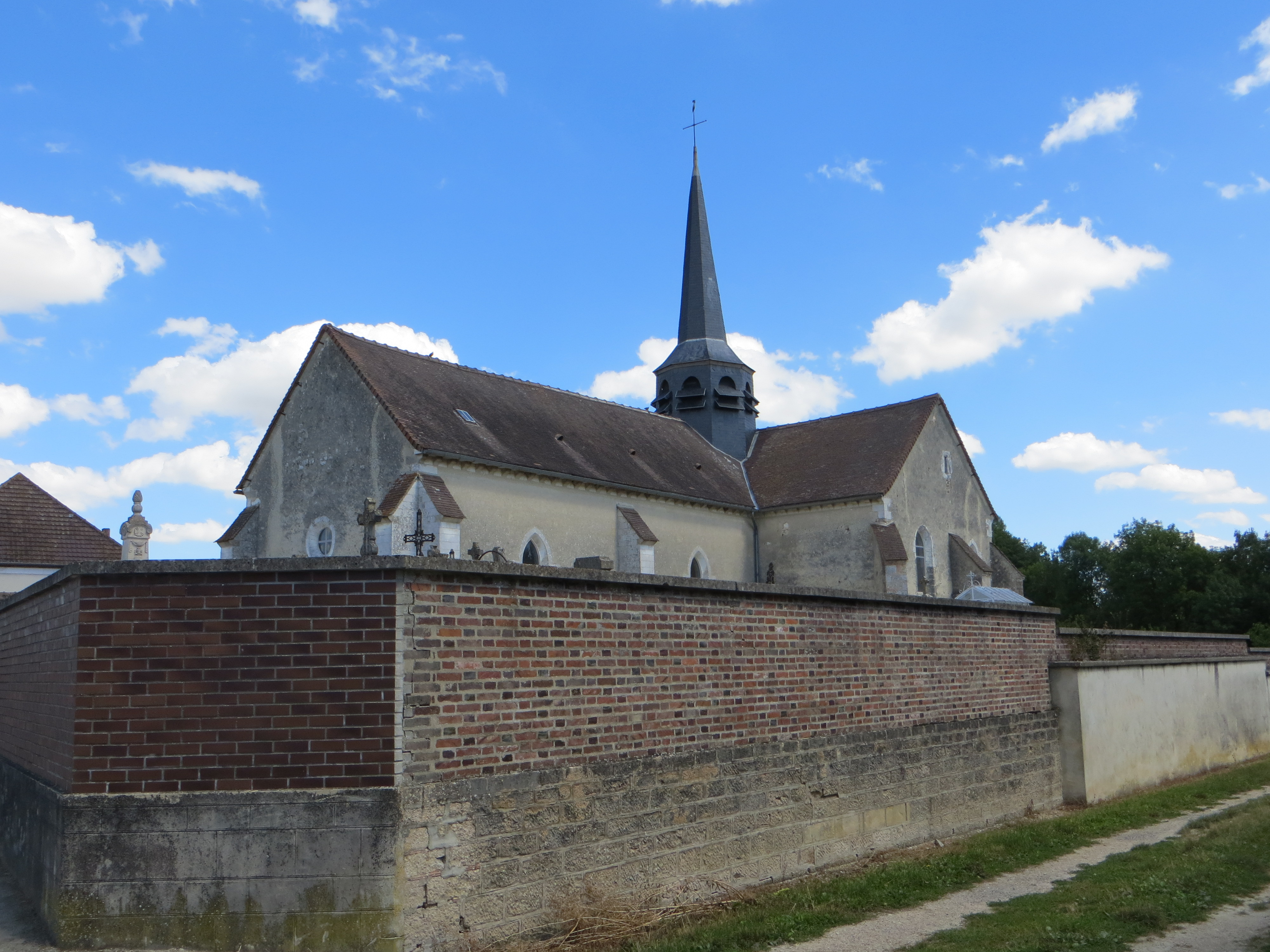 Vue générale de l'église